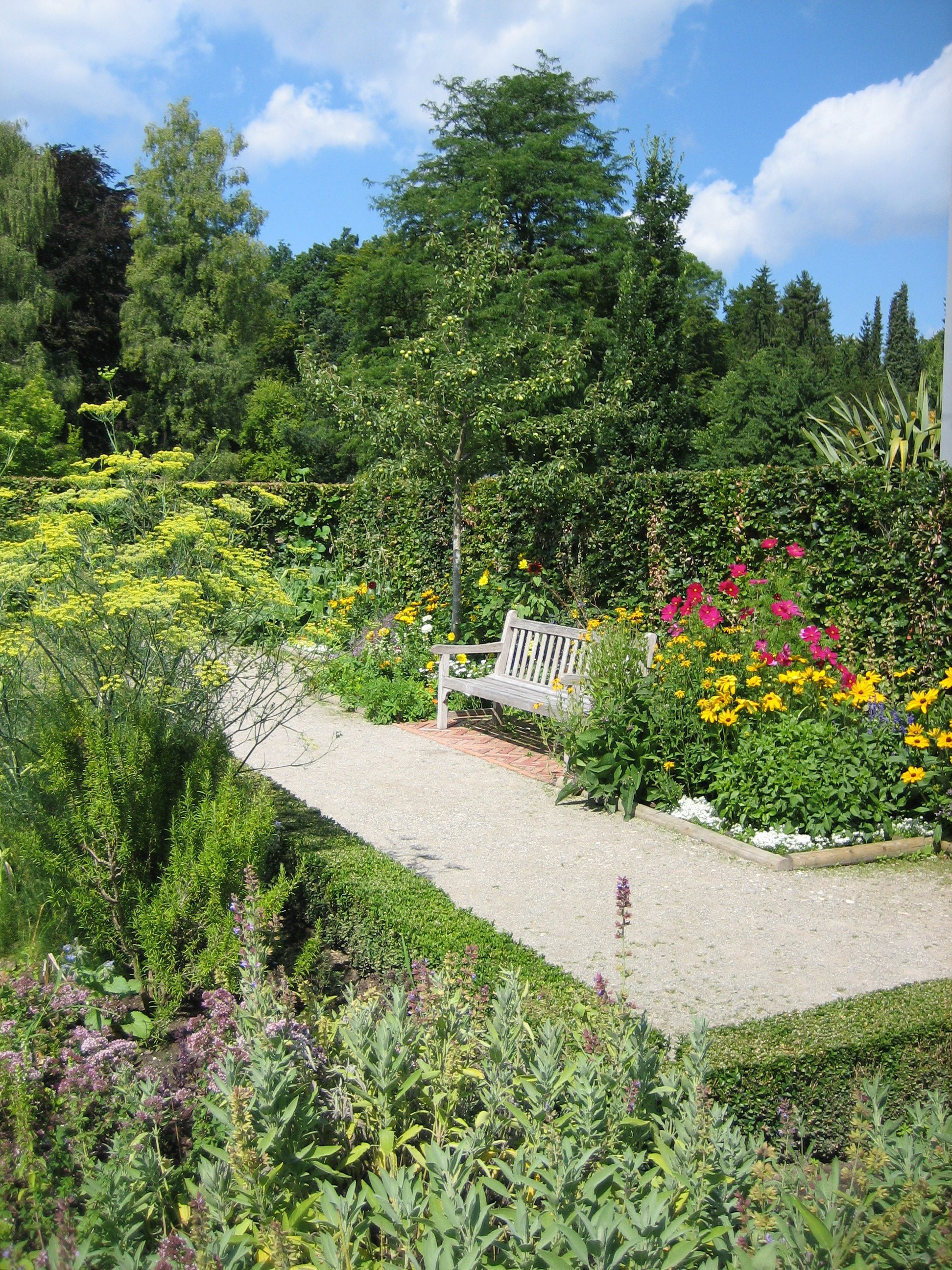 Botanischer Garten in Augsburg, Ruhebank im Bauerngarten